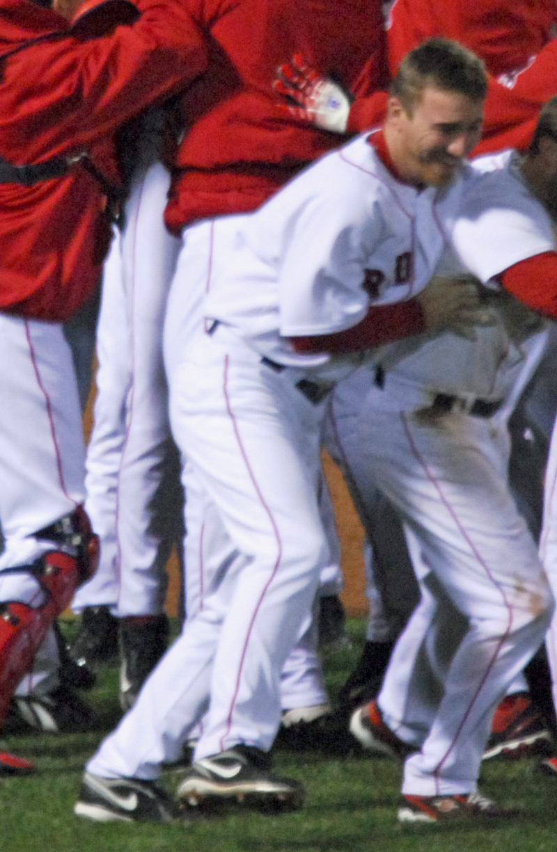 J. D. Drew